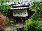 奥多摩町大丹波地区にある飲食店。釜飯屋として全国的に有名な店。